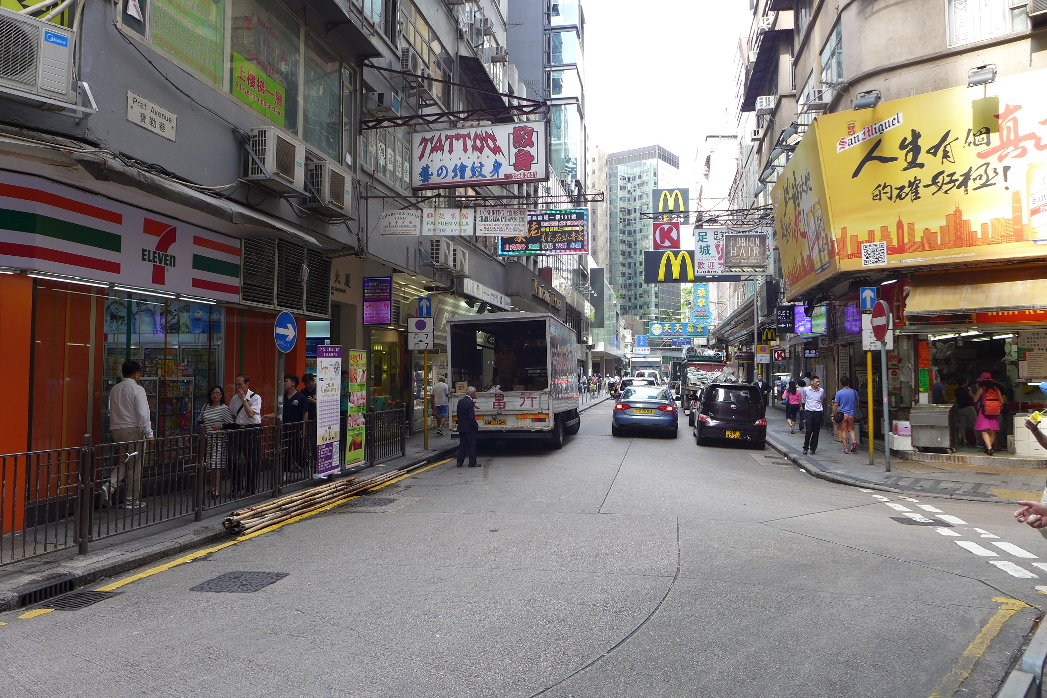 Prat Avenue